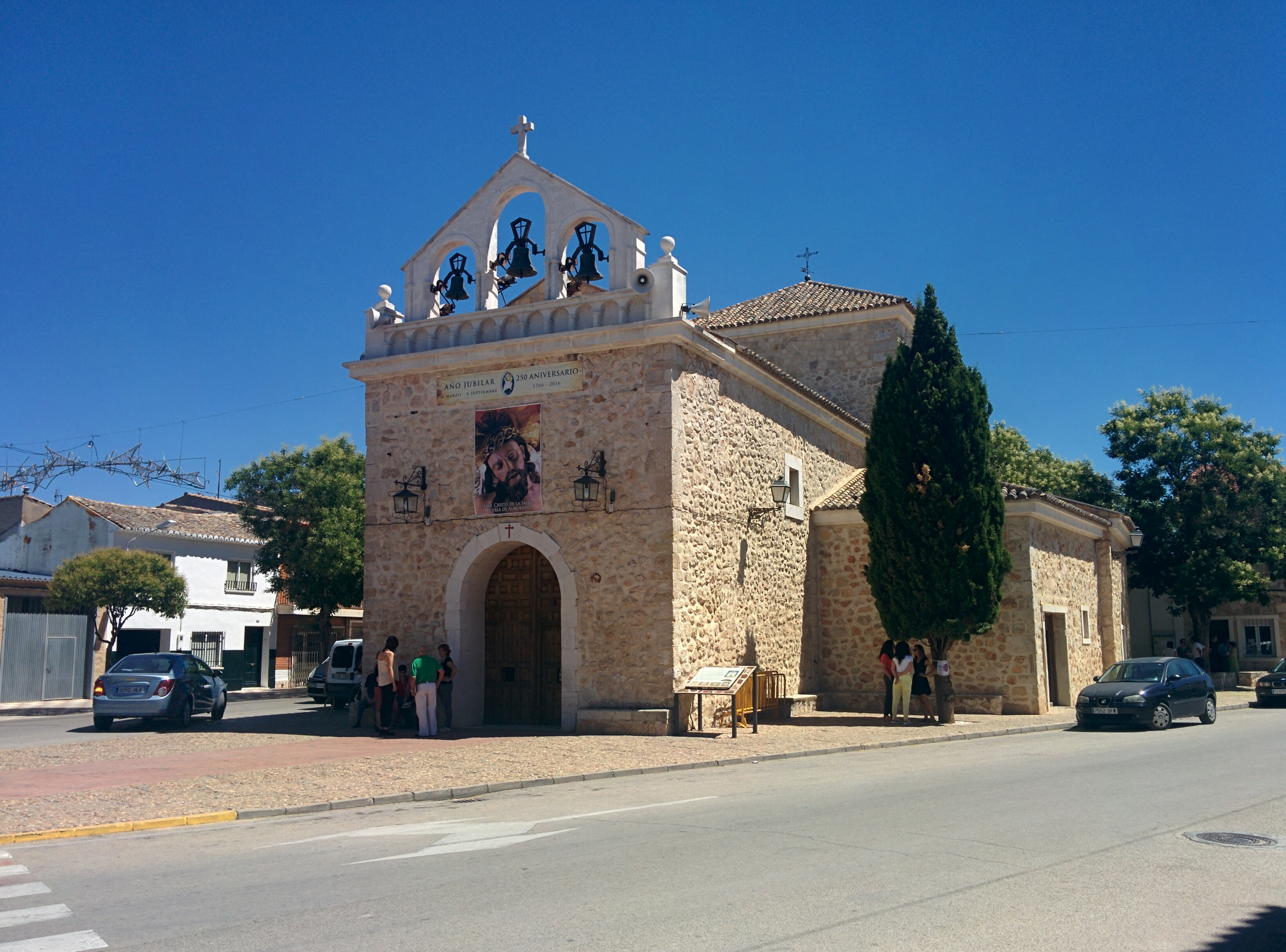 Ermita del Santísimo Cristo de la Salud, en La Puebla de Almoradiel (Toledo, España).